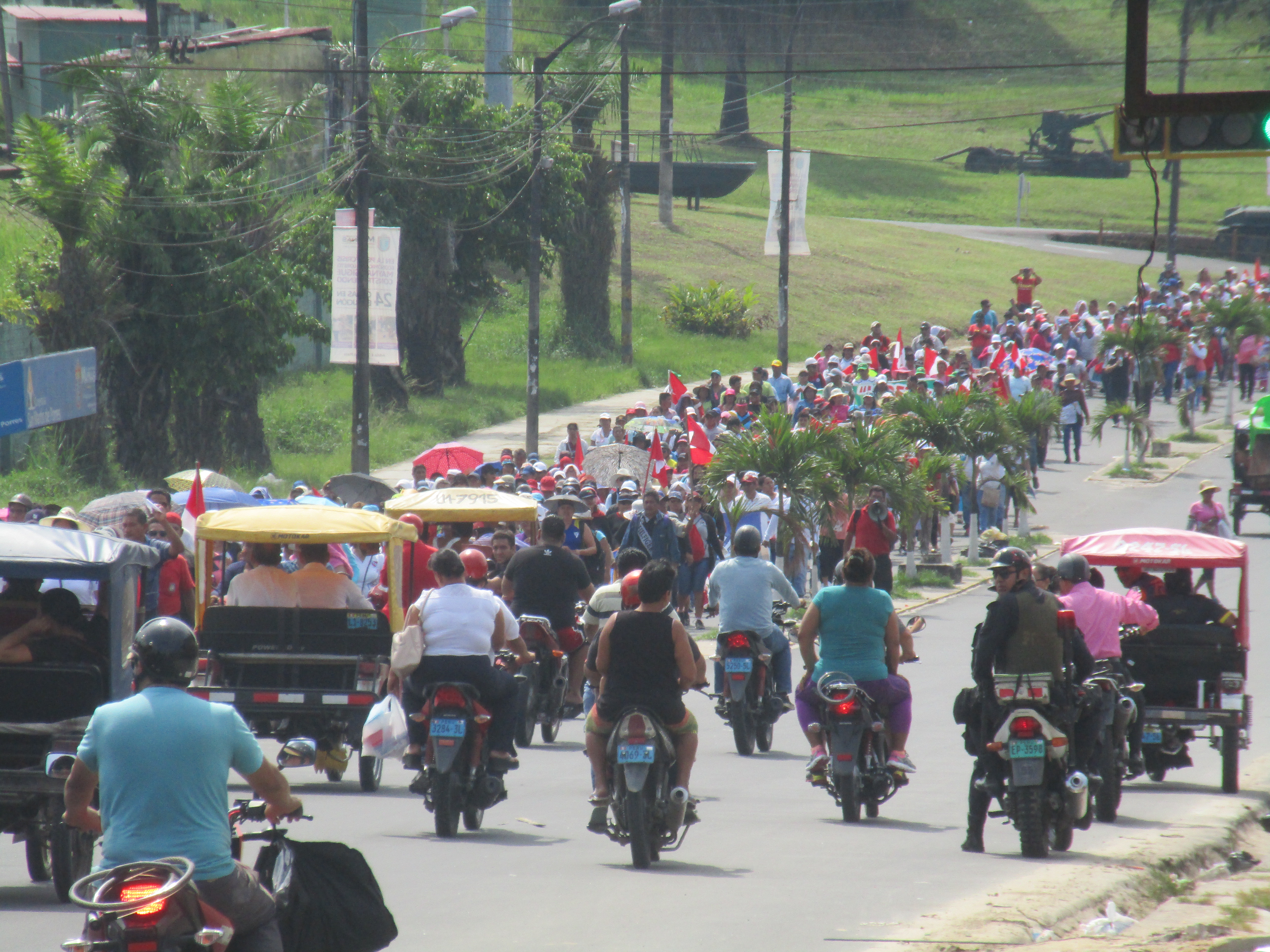 Profesores y médicos en la huelga nacional peruana de 2017